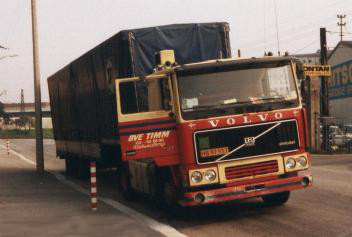 Volvo F 12